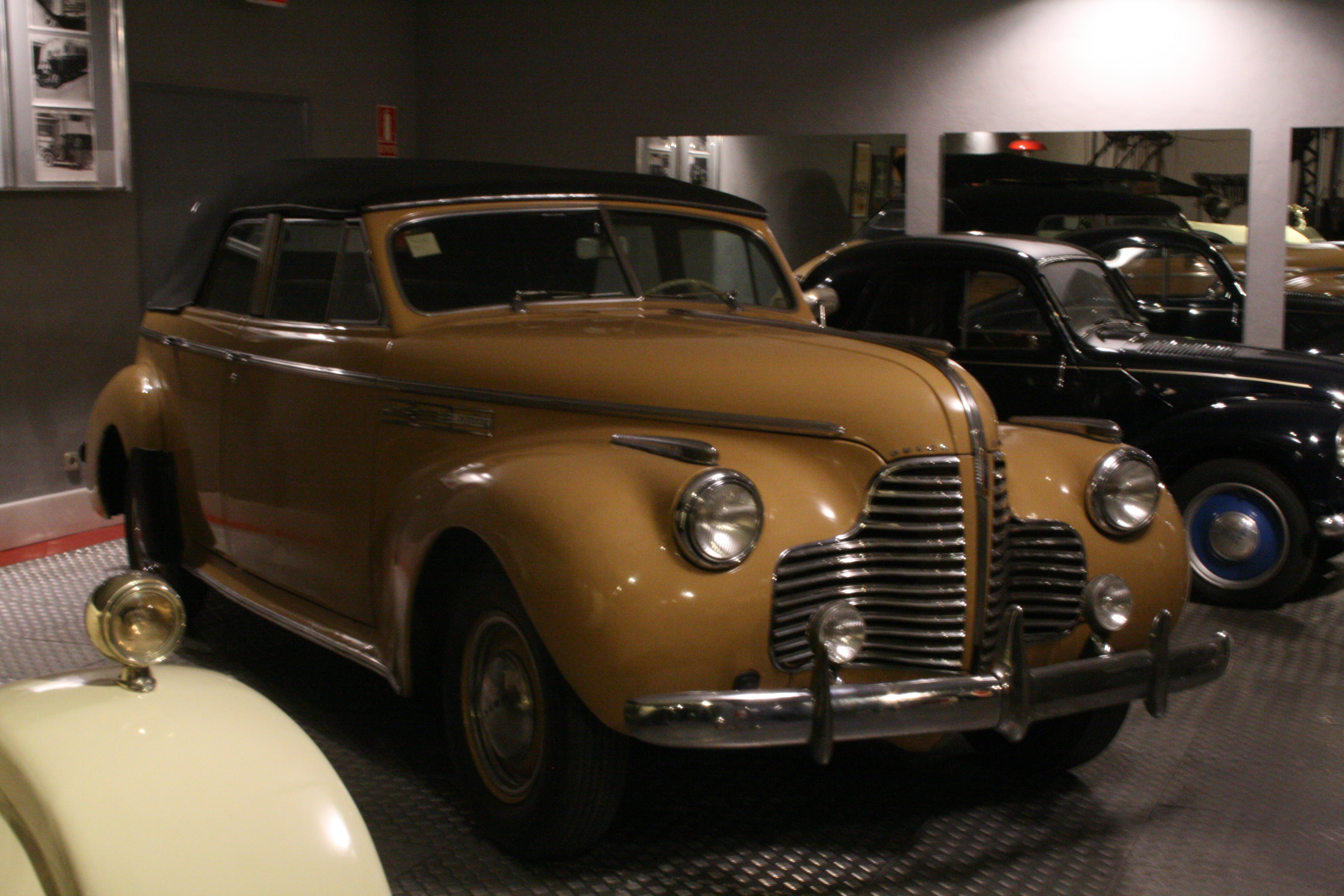 Buick Eight Museo de Historia de la Automoción de Salamanca Native nameMuseo de Historia de la Automoción (Salamanca)LocationSalamanca, (Spain)Coordinates40° 57′ 29.73″ N, 5° 40′ 00.95″ W Established2002Web page control : Q6034050 institution QS:P195,Q6034050